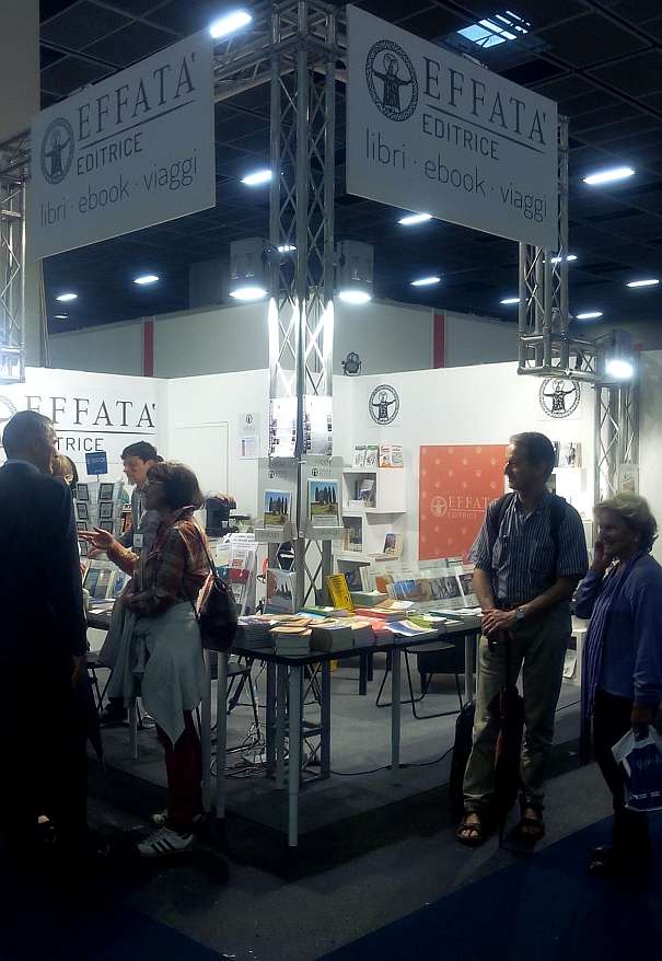 Stand edizioni Effatà - salone del libro 2016